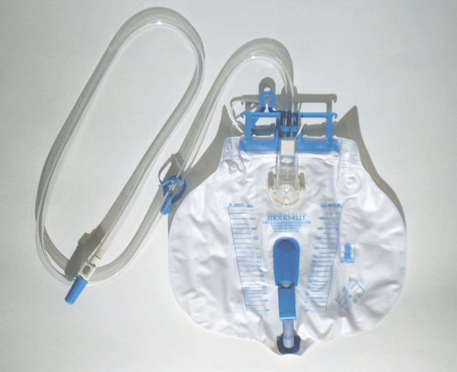 Monoflo® Urin-Bettbeutel bei Harninkontinenz